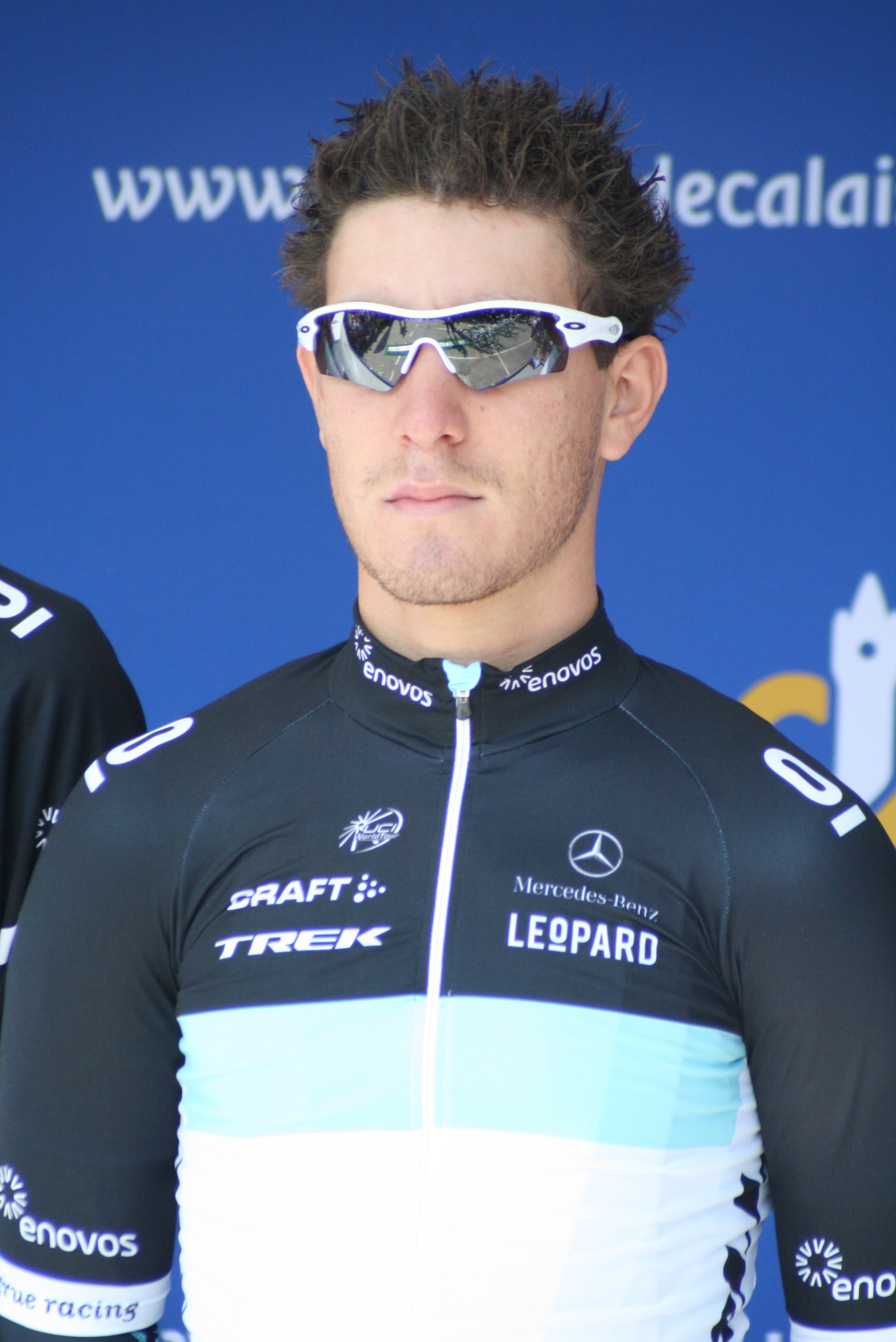 Présentation des coureurs au départ de la première étape Giacomo Nizzolo